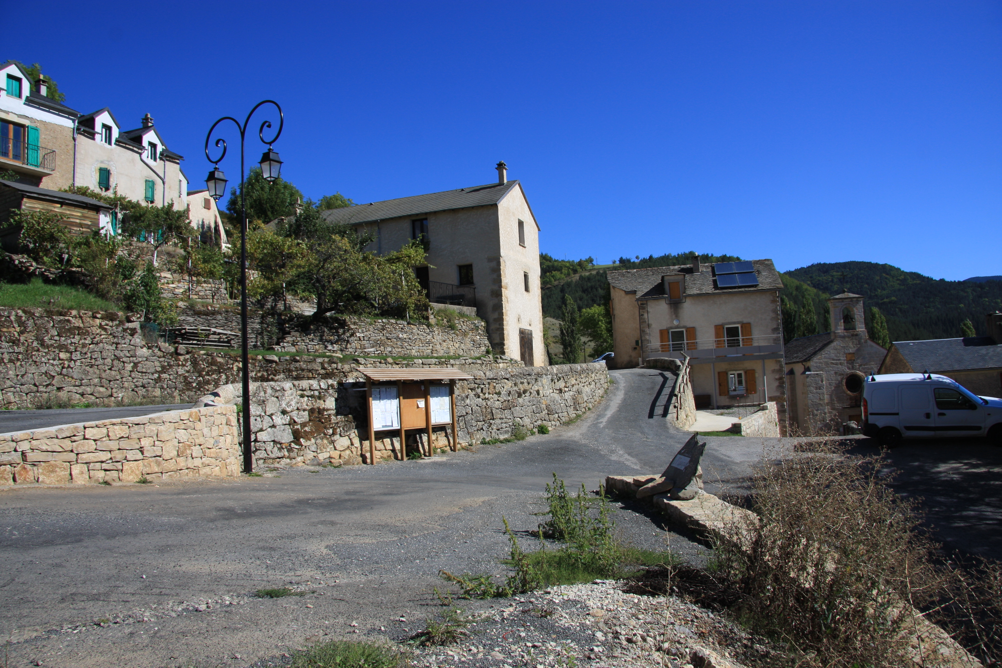 Gatuzières